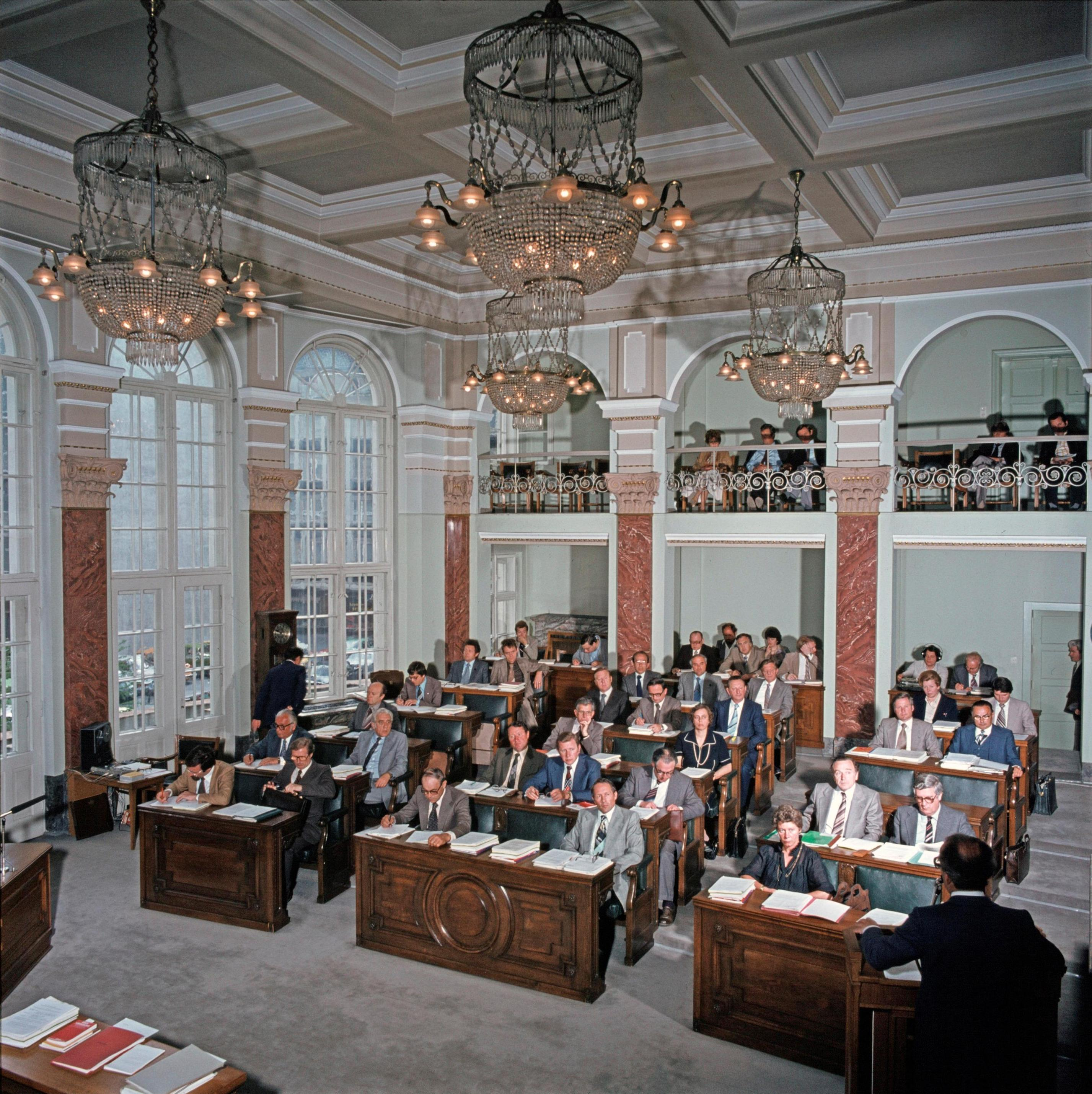 Sitzung des Vorarlberger Landtags im Mai 1979 kurz vor dem Umzug ins neue Landhaus, hier noch im Landtagssitzungssaal im alten Landhaus in der Bregenzer Jahnstraße.